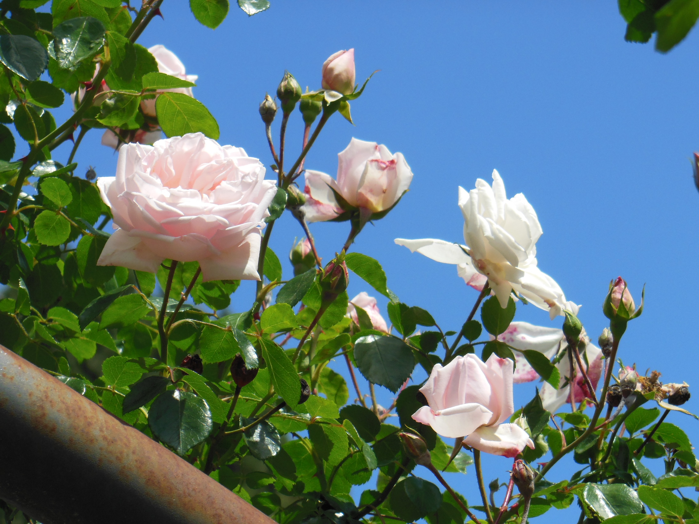 Rosa del cultivar 'New Dawn' nel Roseto di Roma Capitale